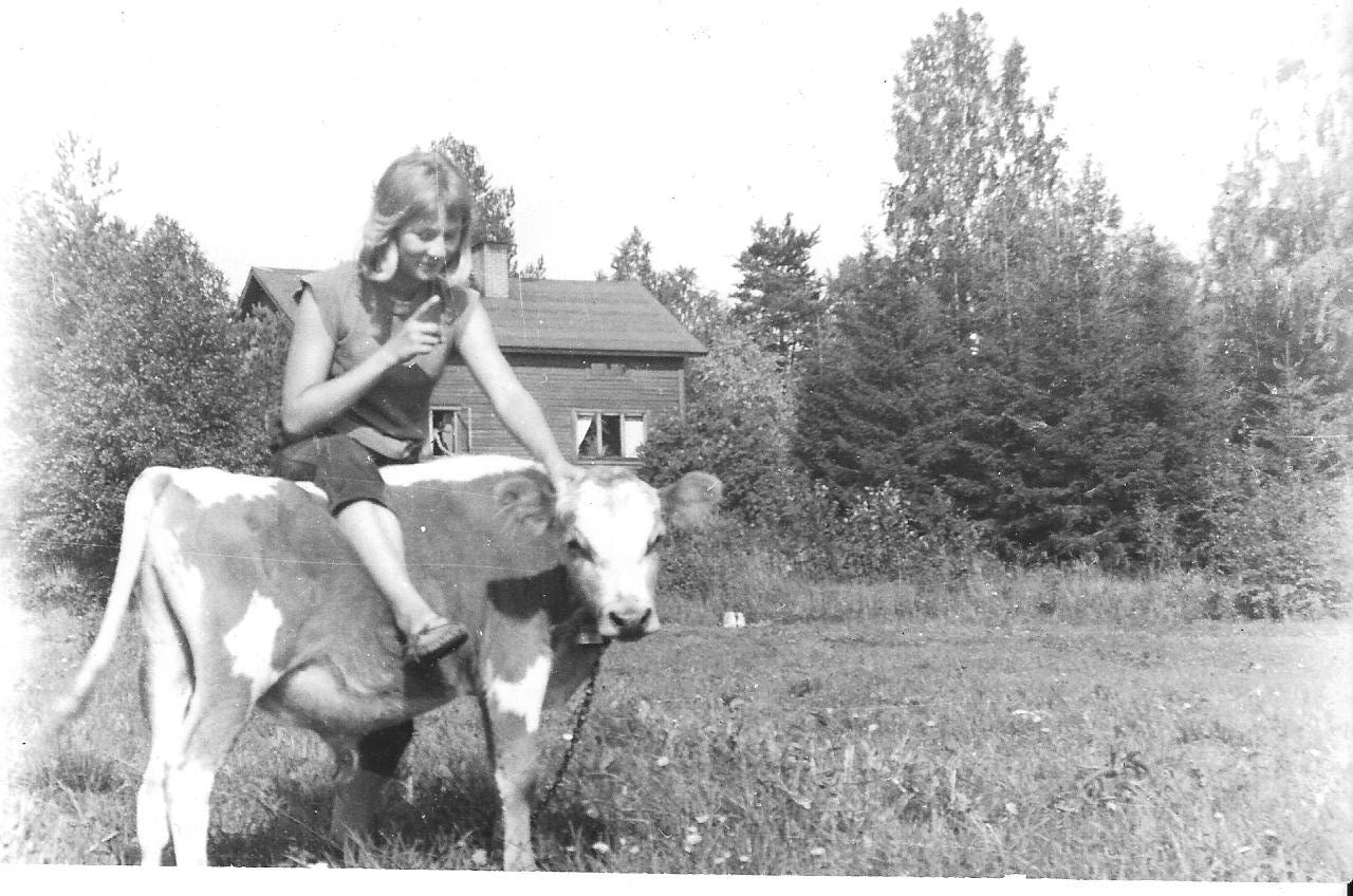 Devant la maison familiale de Liperi avec un veau.